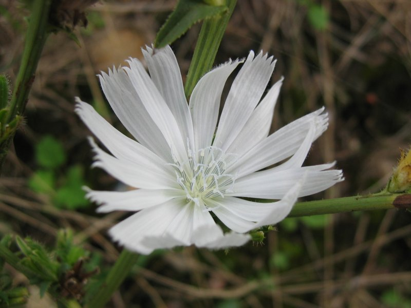 Weiße Wegwarte Cichorium intybus, Wismarbucht